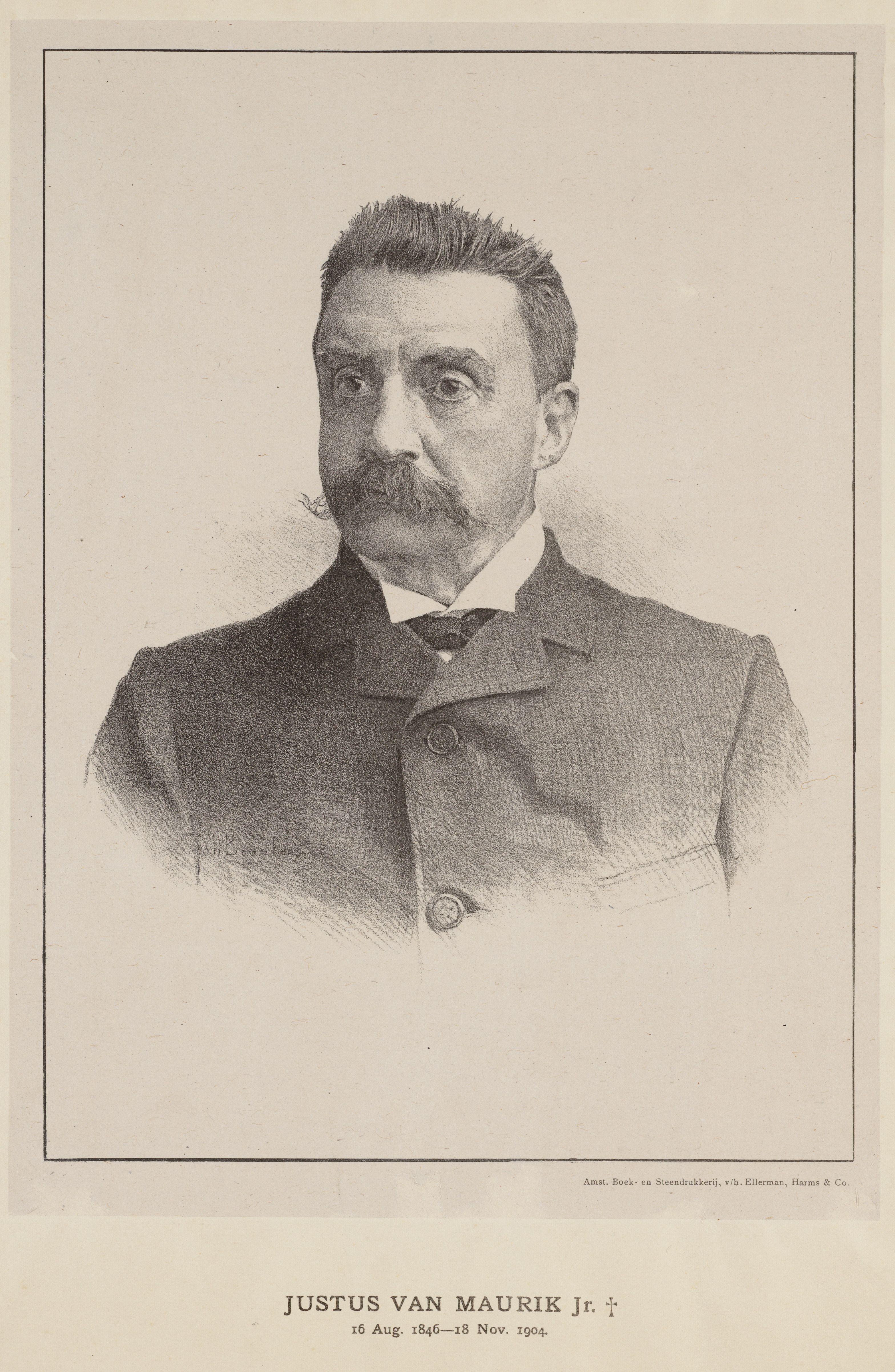 Beschrijving Justus van Maurik Jr. (1846-1904) Sigarenfabrikant; letterkundige, vooral bekend door zijn schetsen van het Amsterdamse volksleven. Portret, uitgegeven naar aanleiding van zijn overlijden. Documenttype prent Vervaardiger Braakensiek, J.C. (Johan Coenraad, 1858-1940) Collectie Collectie Atlas Dreesmann Datering november 1904 Geportretteerde Maurik, J. van, (Justus; 1846-1904) Inventarissen Afbeeldingsbestand 010094007650